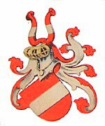 Wappen derer von Bichelsee, Truchsessen der Abtei St. Gallen